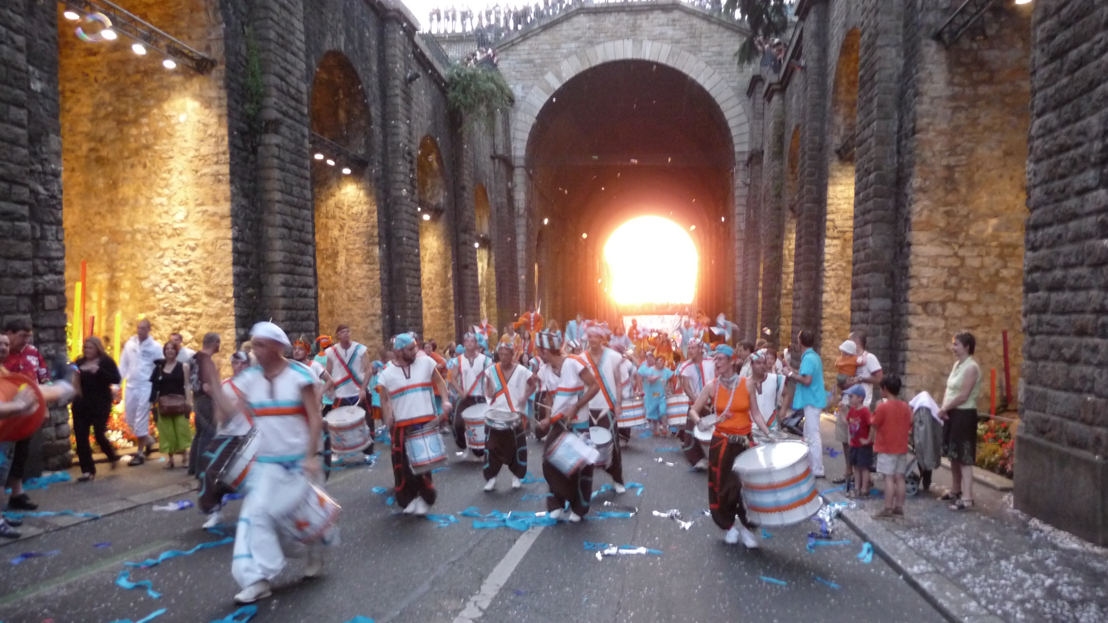 Une fête de rue au mans durant l'été 2009.